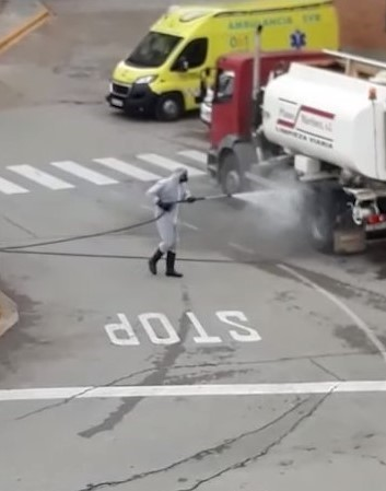 Desinfectación de las calles de Caspe (Aragón) el primer lunes de cuarentena para frenar la expansión del coronavirus.